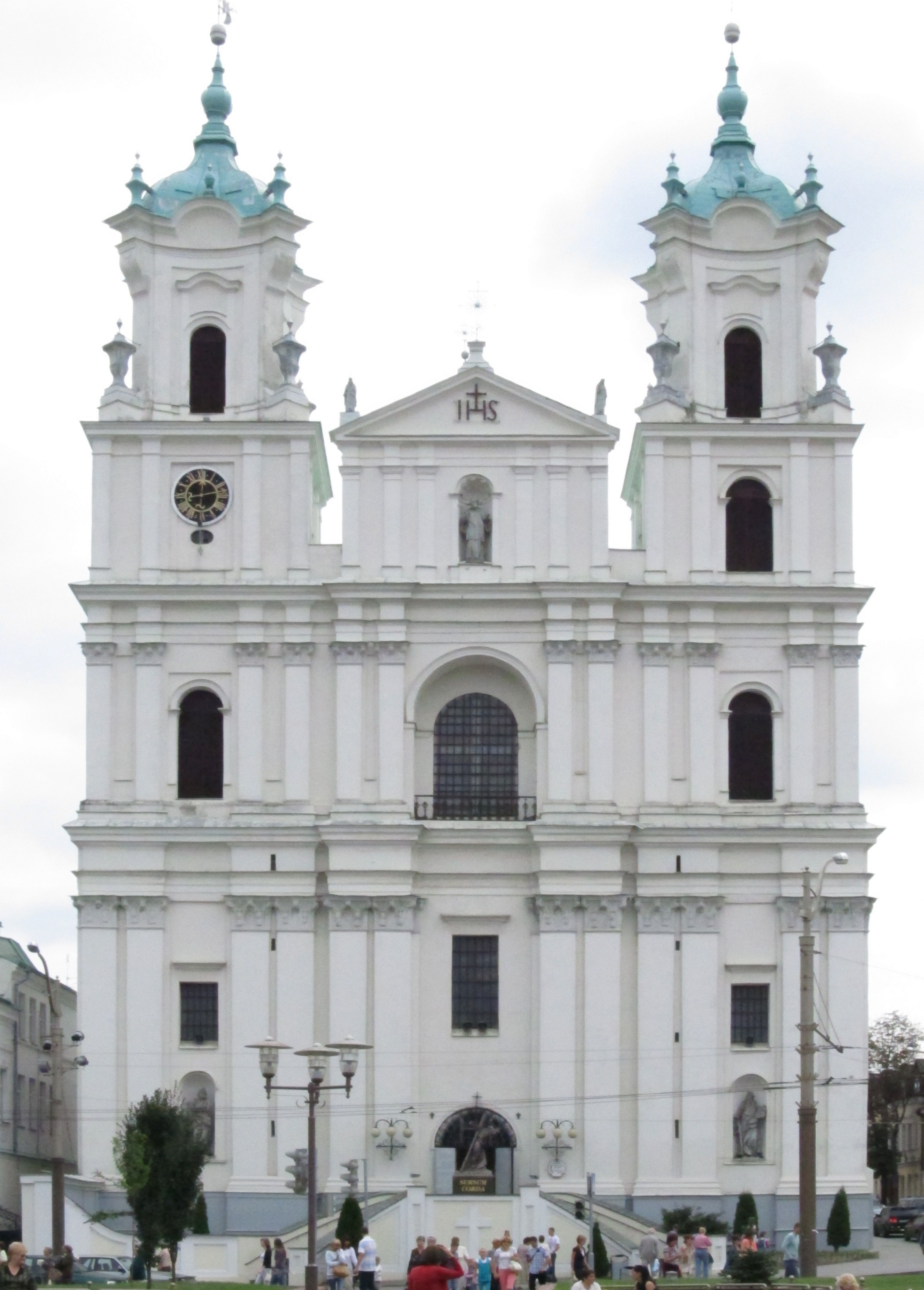 Беларуская (тарашкевіца): Ансамбль былога кляштара езуітаў:касьцёлдэкаратыўнае аздабленьне інтэр’ера касьцёла: галоўны алтар, 12 алтароў, амбон, 16 фрэскавых кампазіцый, фрэскі на парусах, росьпісы на падпружных арках, помнік на магіле А. Тызэнгаўза, арган, лаваў прэсбітэрыі, расьпісаная на тэмы жыційных сюжэтаў, два таршэры ў прэсбітэрыі, дзьве спавядальніжылыя карпусыаптэкаагароджа. г. Горадня This is a photo of Belarusian heritage monument. Reference number: 412Г000028 ( WLM)